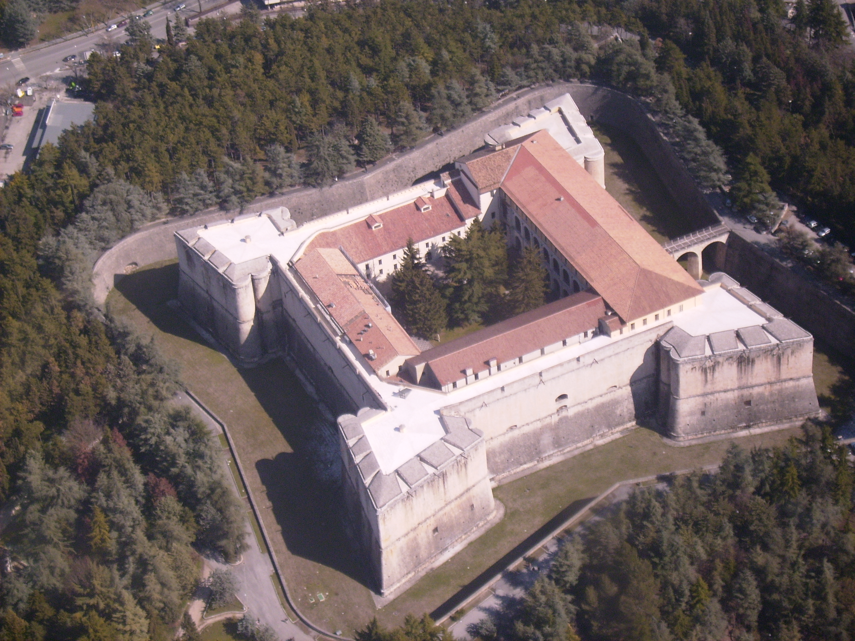 Castello cinquecentesco L'Aquila